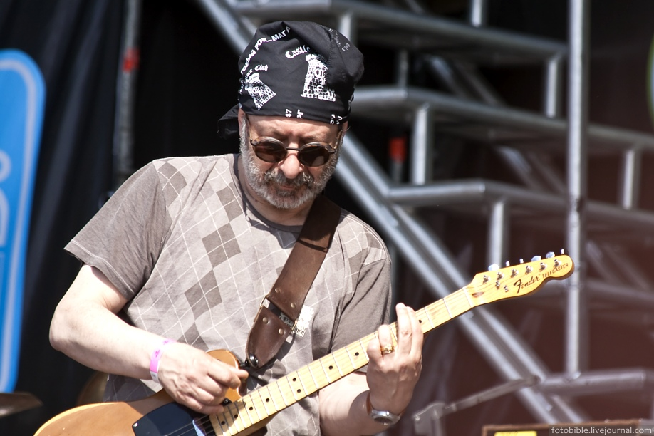 Евгений Маргулис, "Машина времени". Фестиваль "Рок над Волгой 2010"